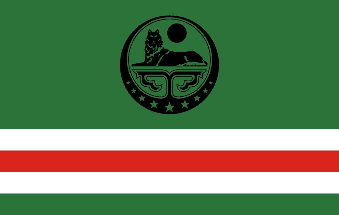 Флаг и герб Чеченской Республики Ичкерия